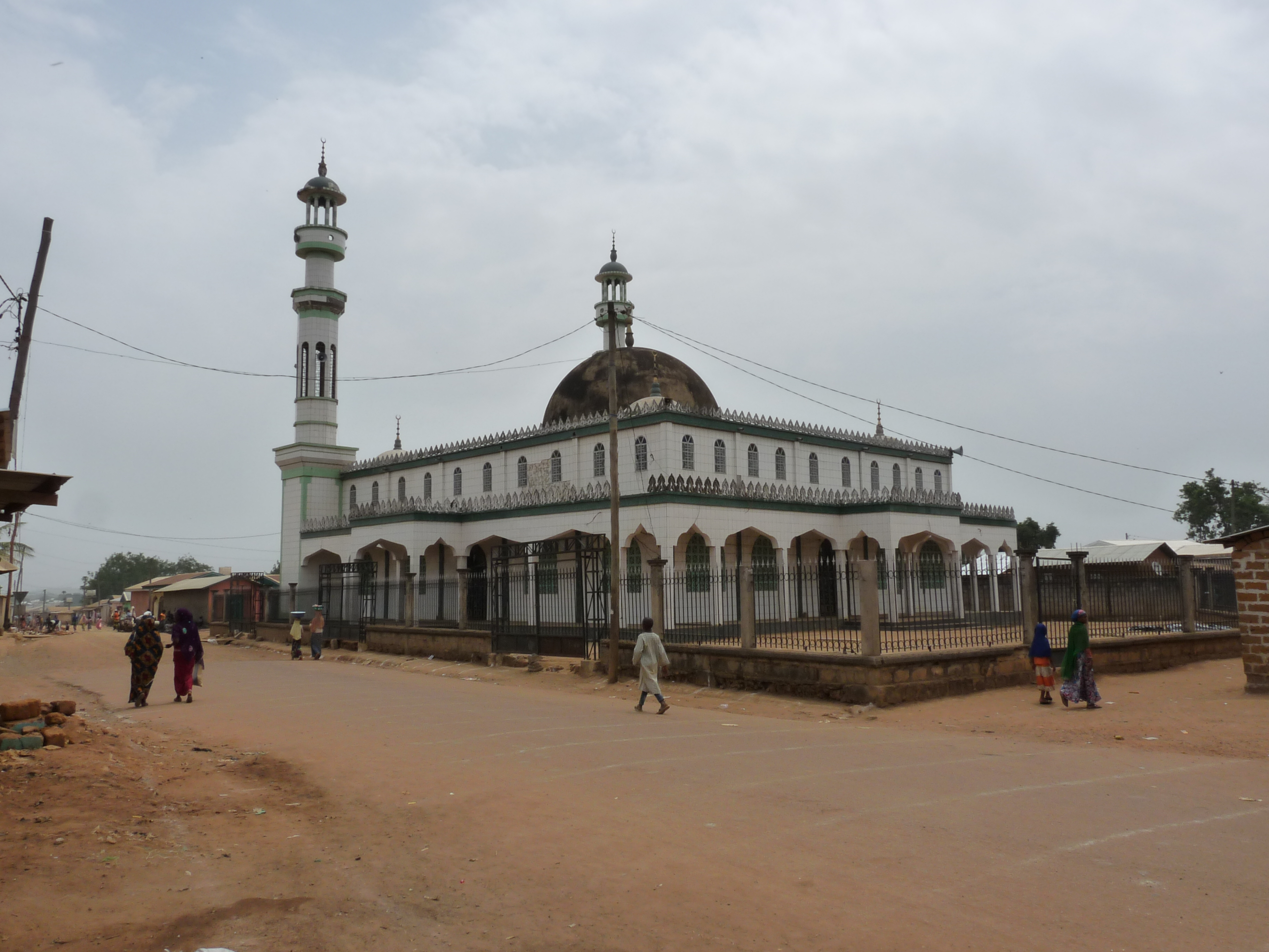 Mosquée de Garoua-Boulai, Cameroun.